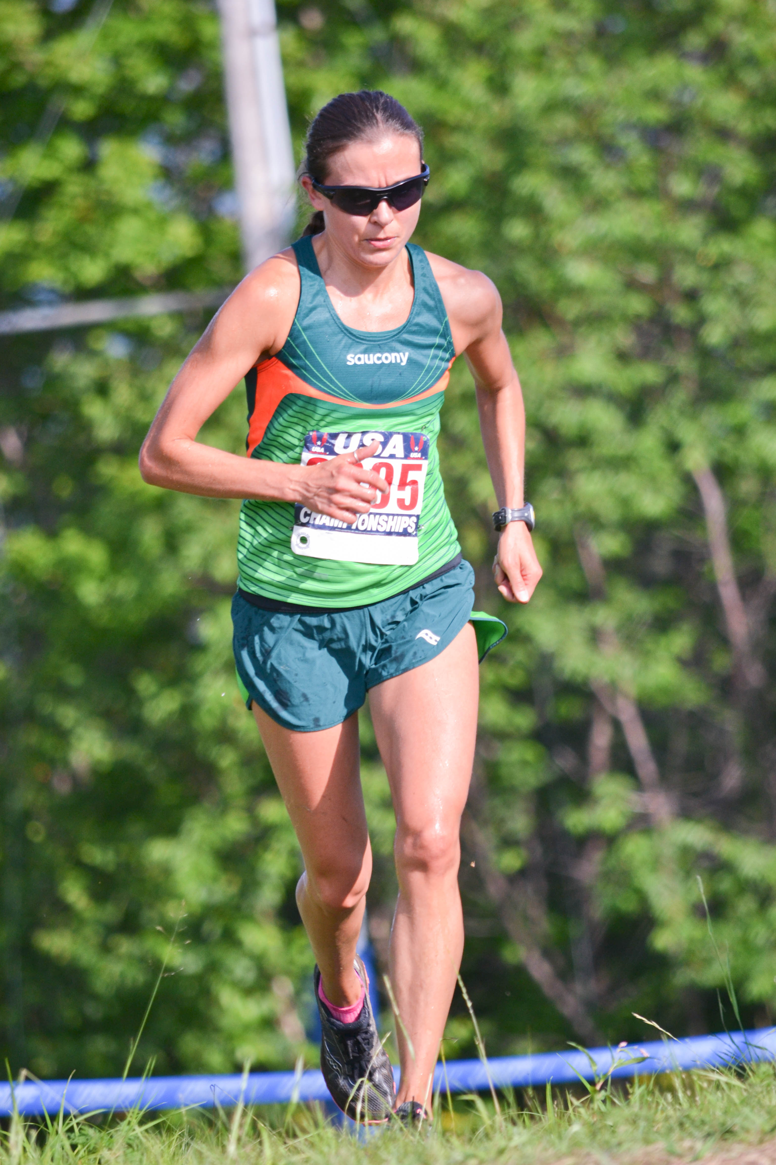 Magdalena Boulet at 2013 Cranmore Hill Climb